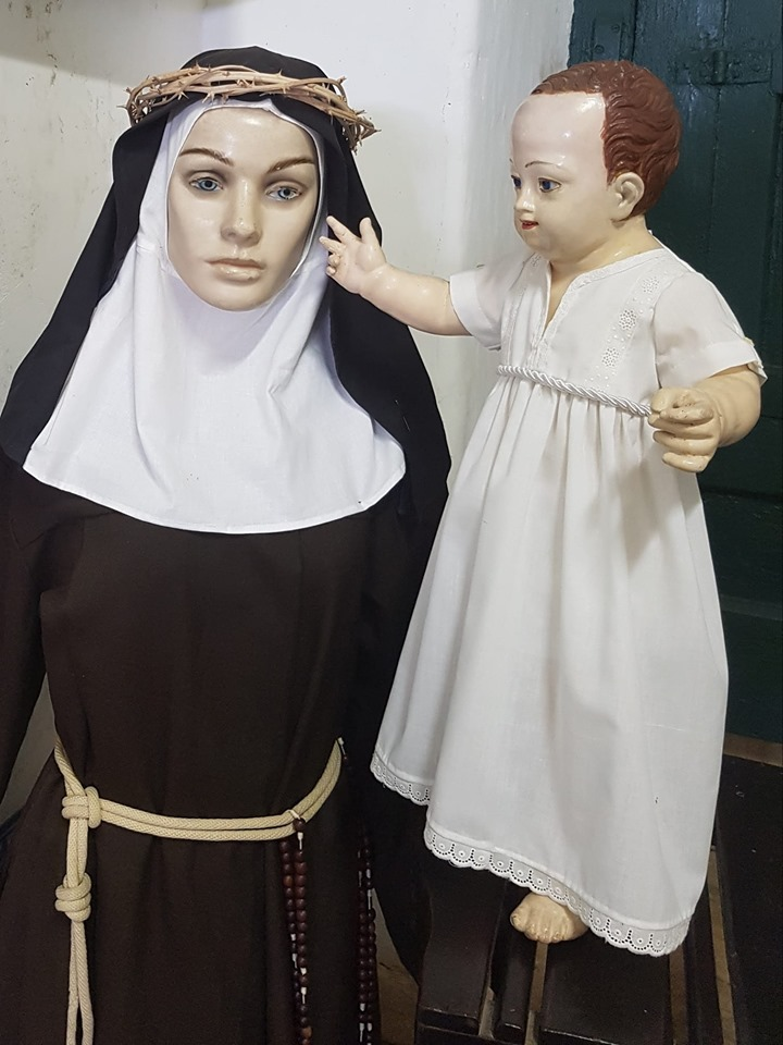 Madre Vitória e o Menino Jesus. Convento do Desterro em Salvador-BA